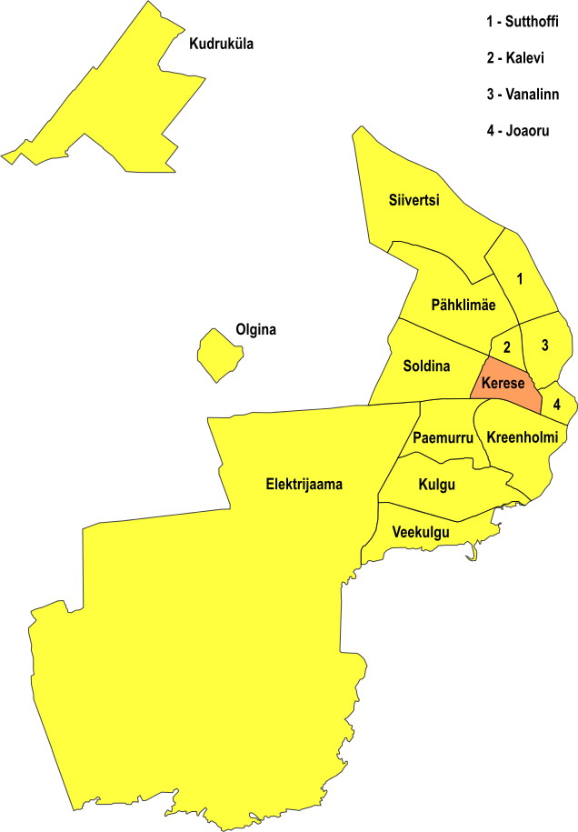 Kerese linnaosa Narvas